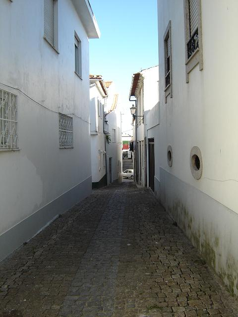 Fão, Esposende, Portugal.